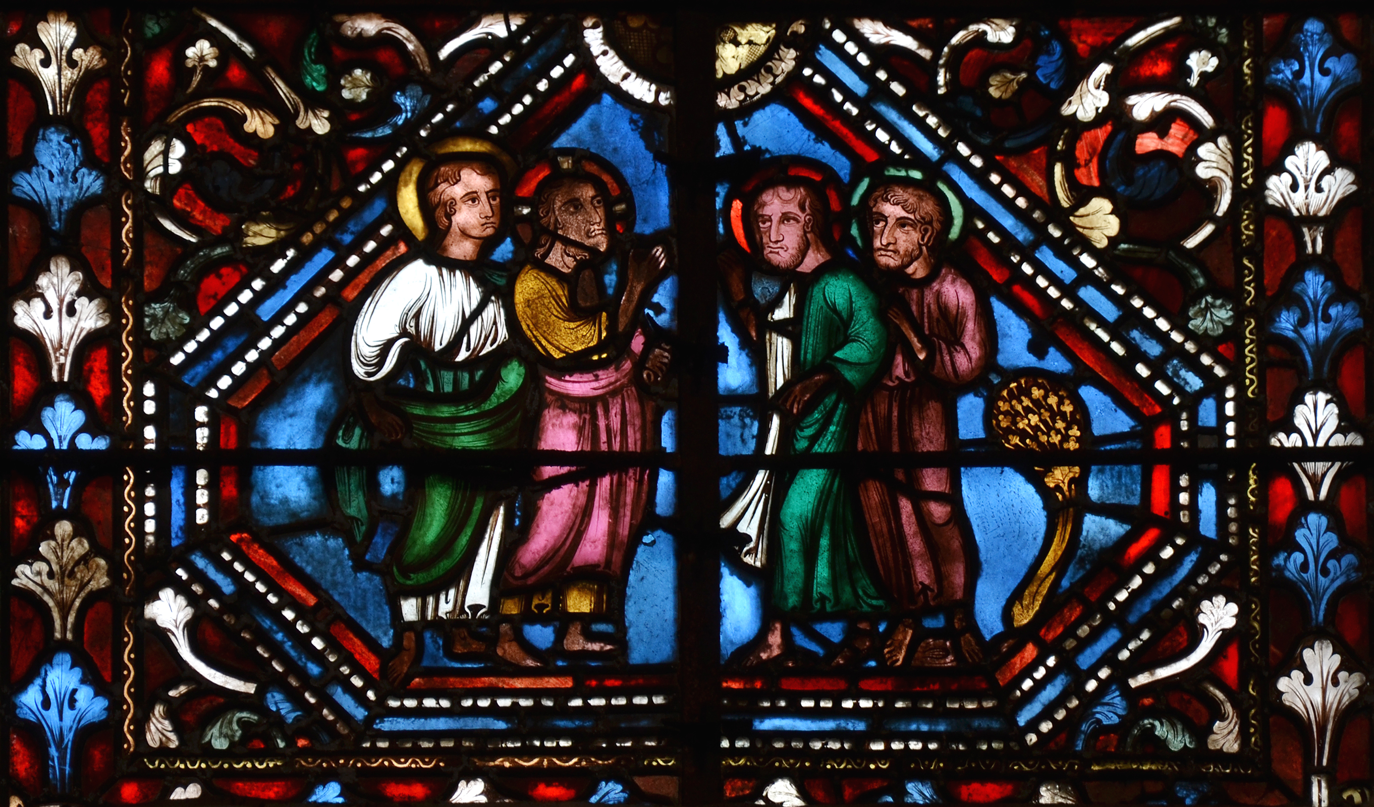 Un vitrail de l'église Notre-Dame à Dijon.